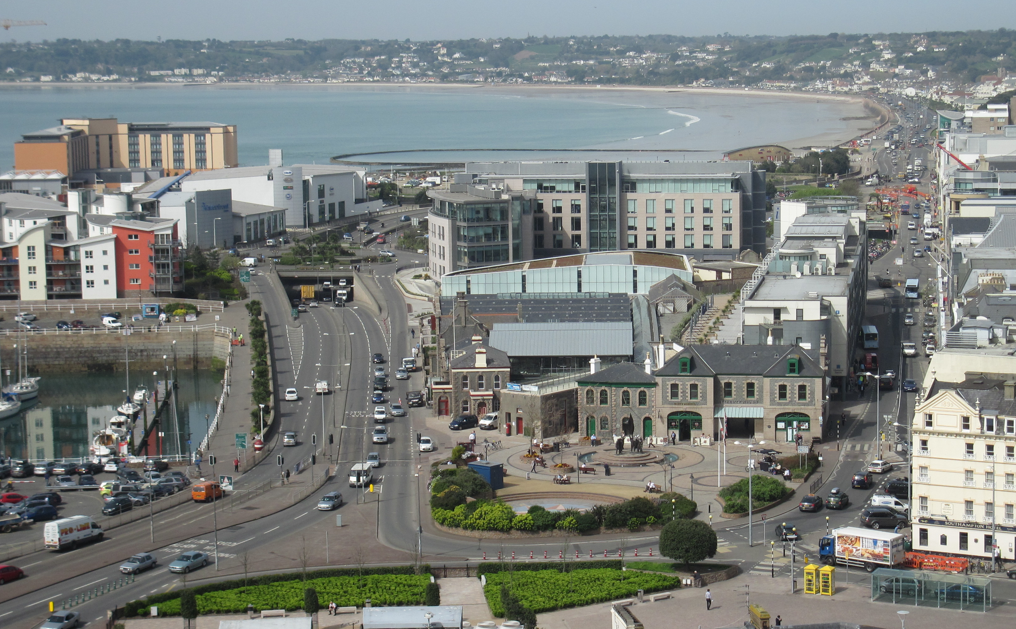 Nrf: Veue du Fort Régent sus la Ville dé Saint Hélyi et l'travèrs d'la Baie d'la Ville